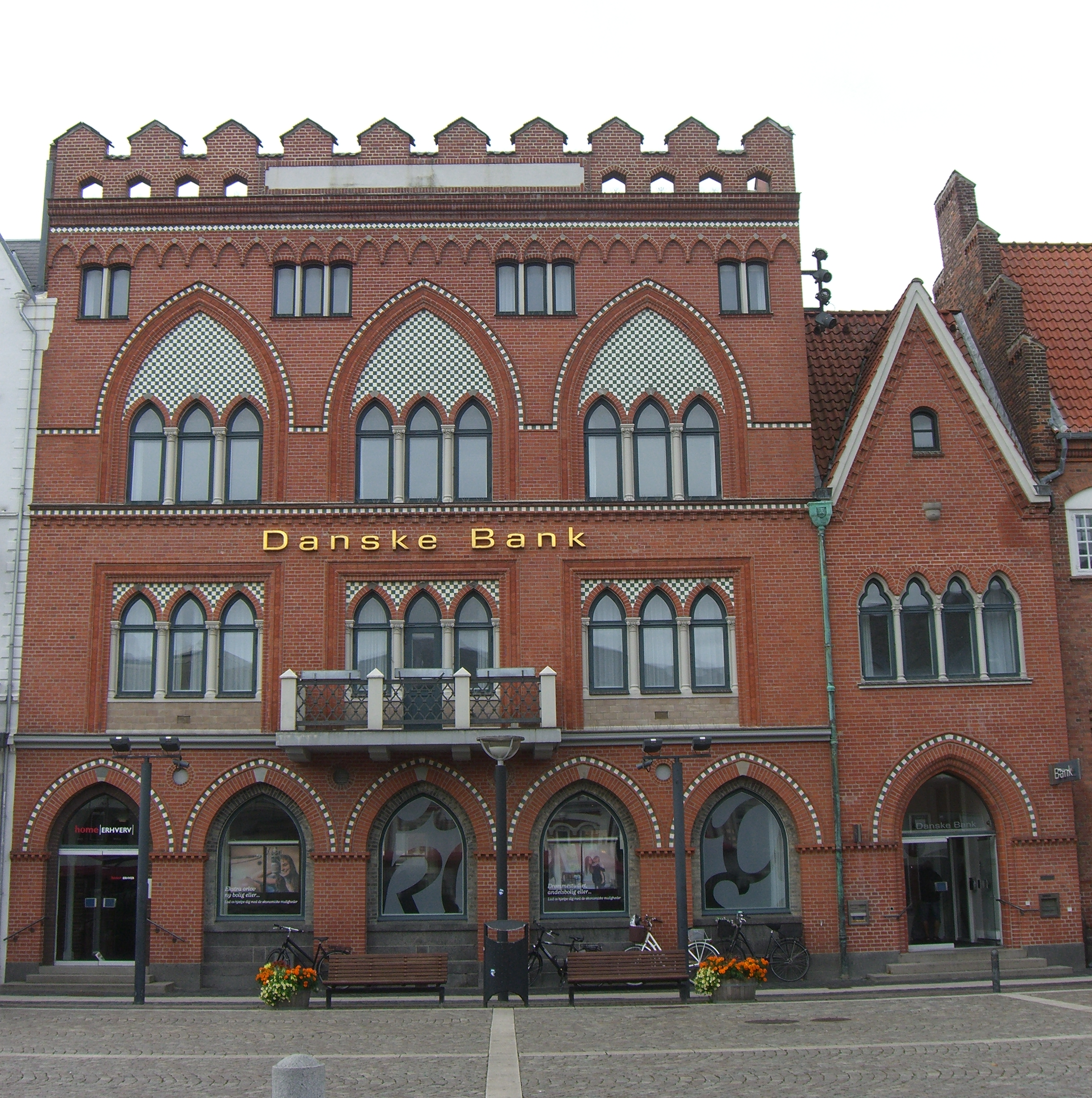 Torvet 18, Esbjerg